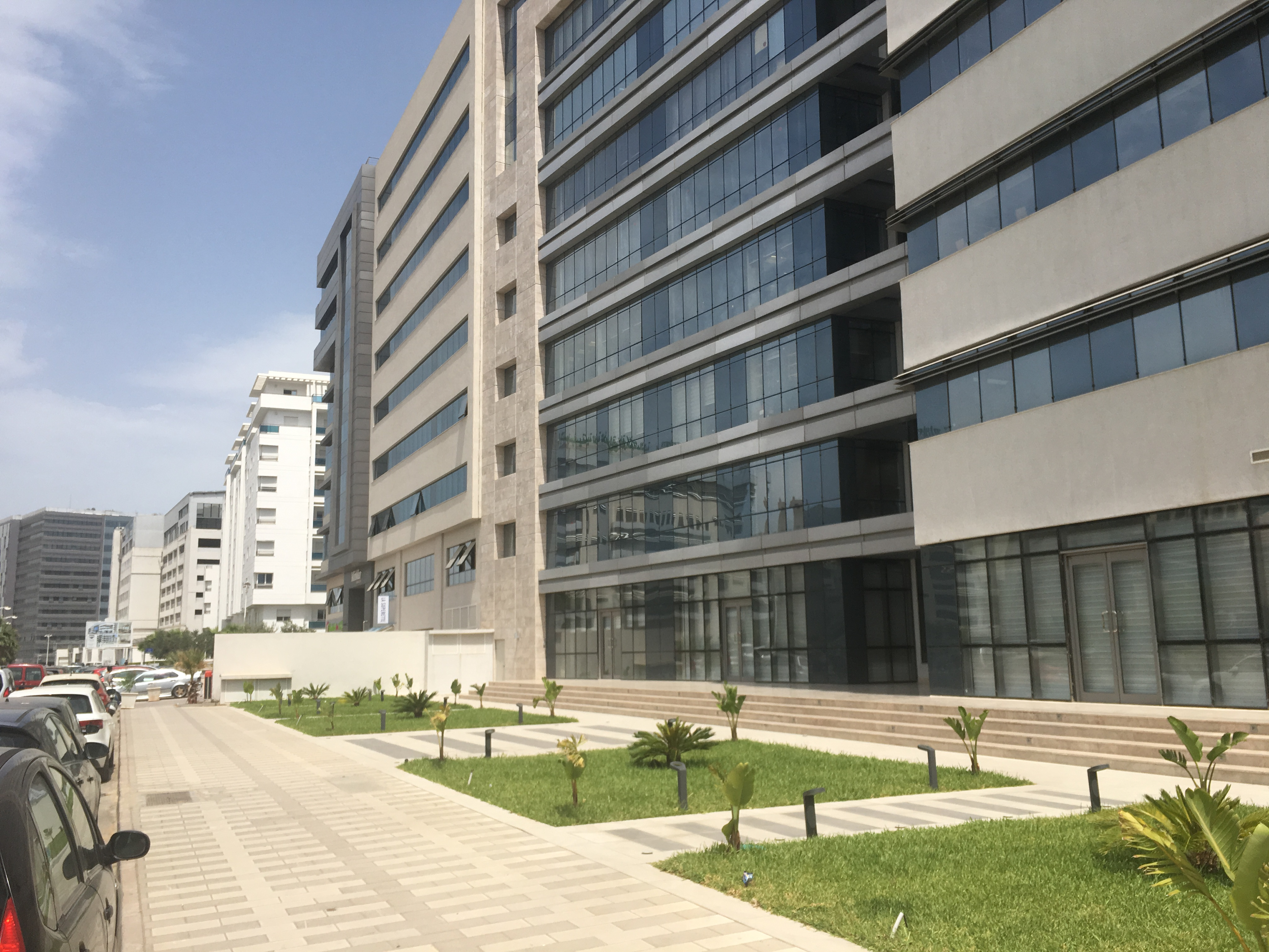 Avenue Safia Chamia (Centre Urbain Nord, Tunis), 2019.